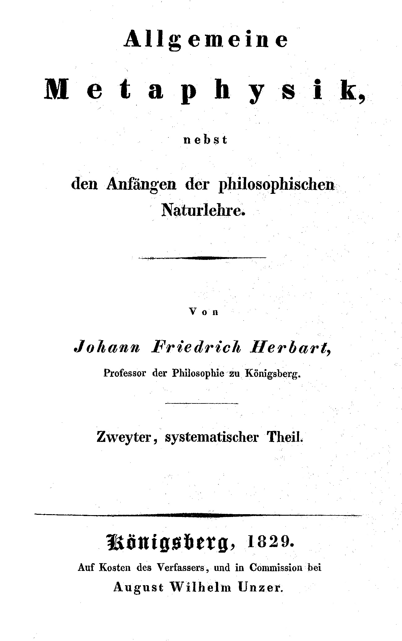 Titelblatt der 1. Auflage von: Herbart, Allgemeine Metaphysik, Teil 2, gescannt